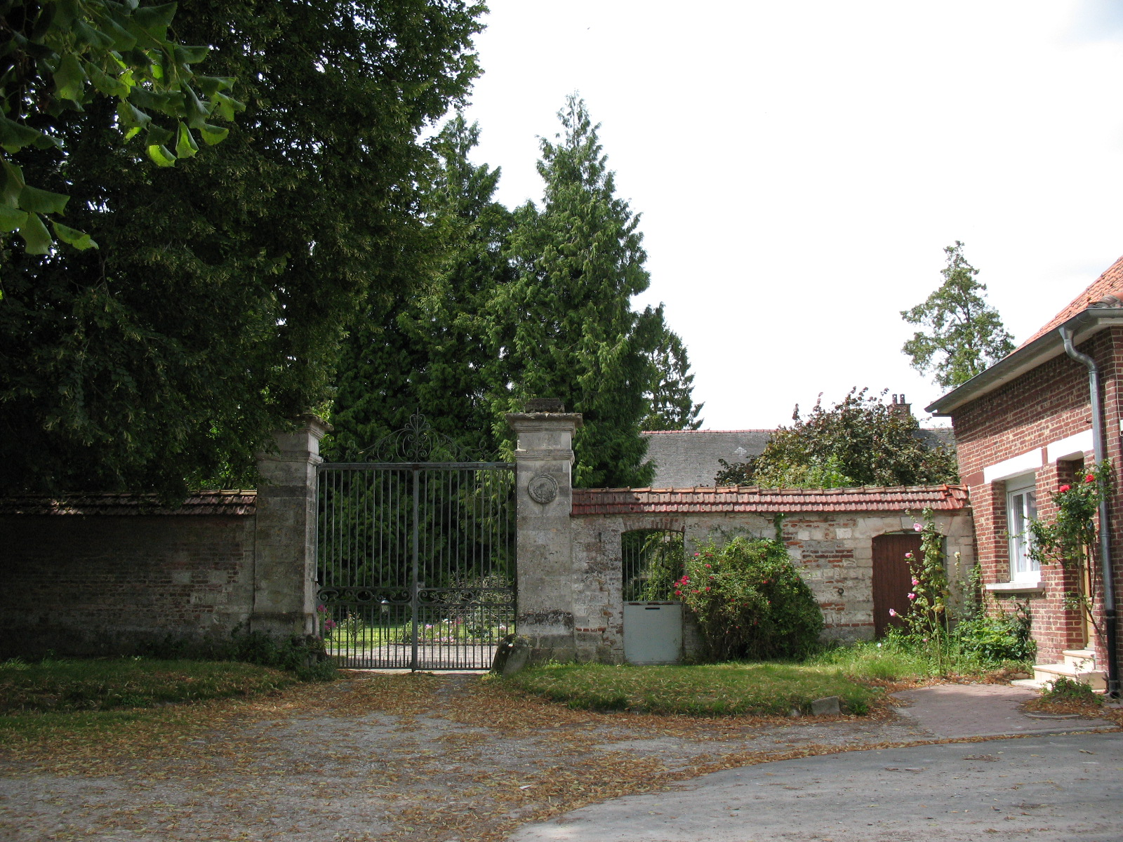 Entrée principale du château : les deux piliers et la porte piétonne.